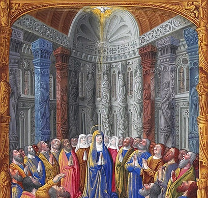 Les Très Riches Heures du duc de Berry, Folio 79r - Pentecost the Musée Condé, Chantilly. Source: modified from